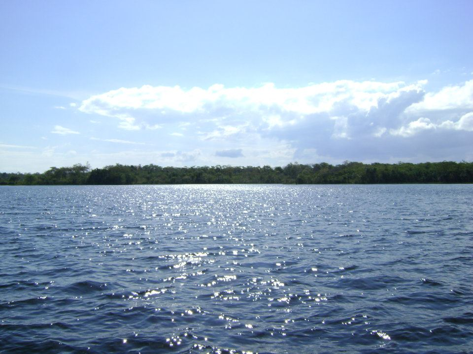 La laguna de Concepcion